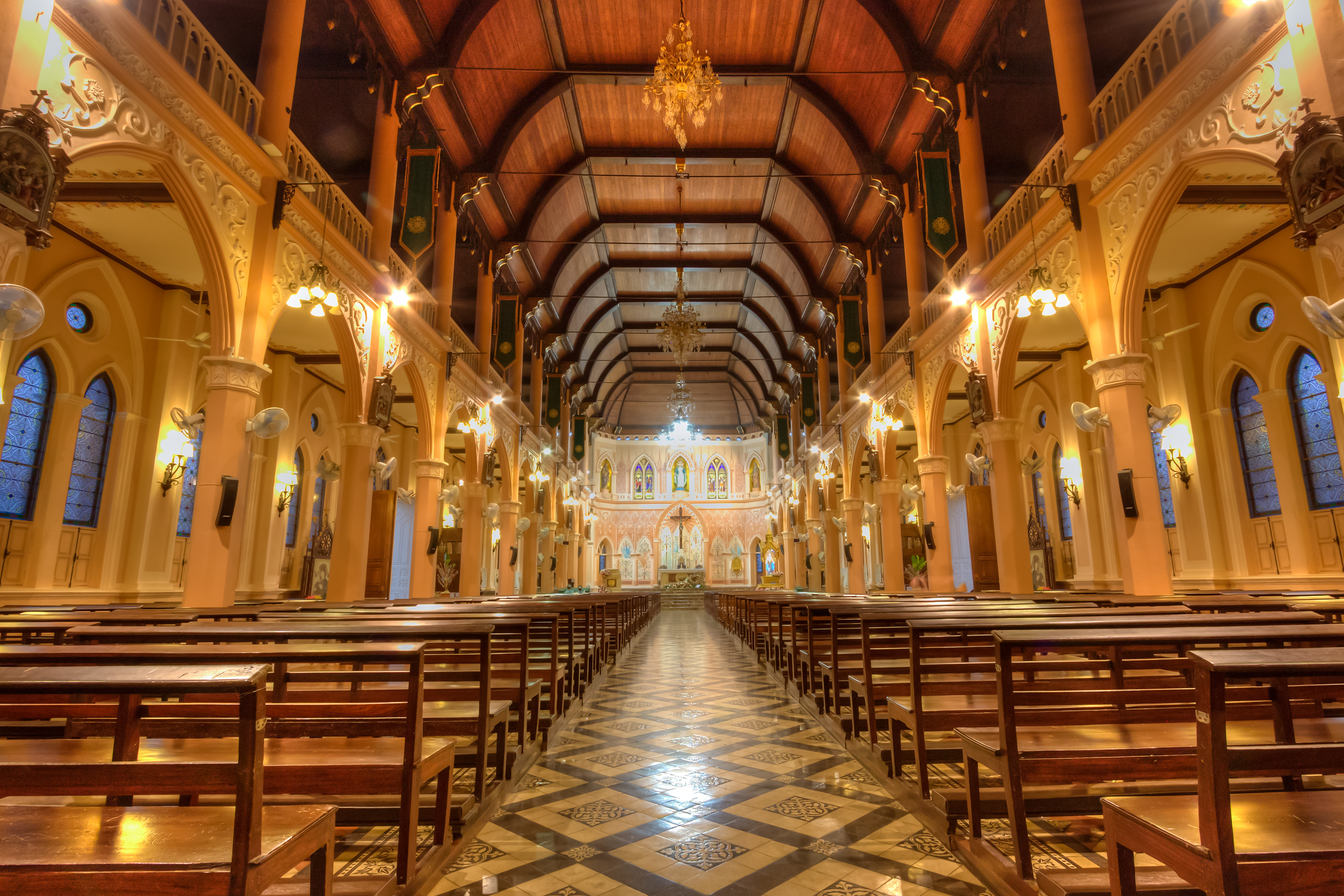 วัดโรมันคาทอลิก